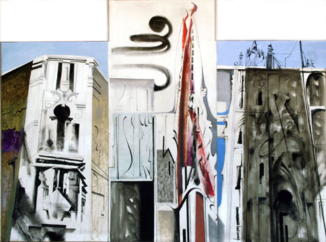 Karl Lorenz Kunz - Ölgemälde: Barcelona